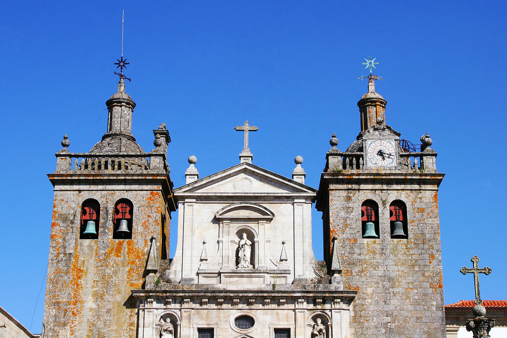 Façade of Viseu Cathedral, Portugal